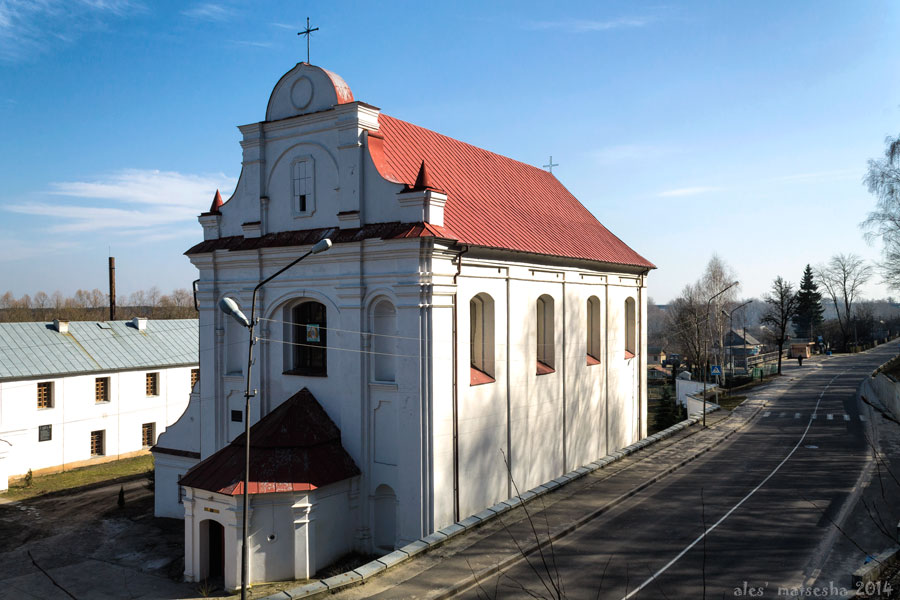 Мазыр. Касцёл Святога Міхала Арханёла і кляштар цыстэрцыянак